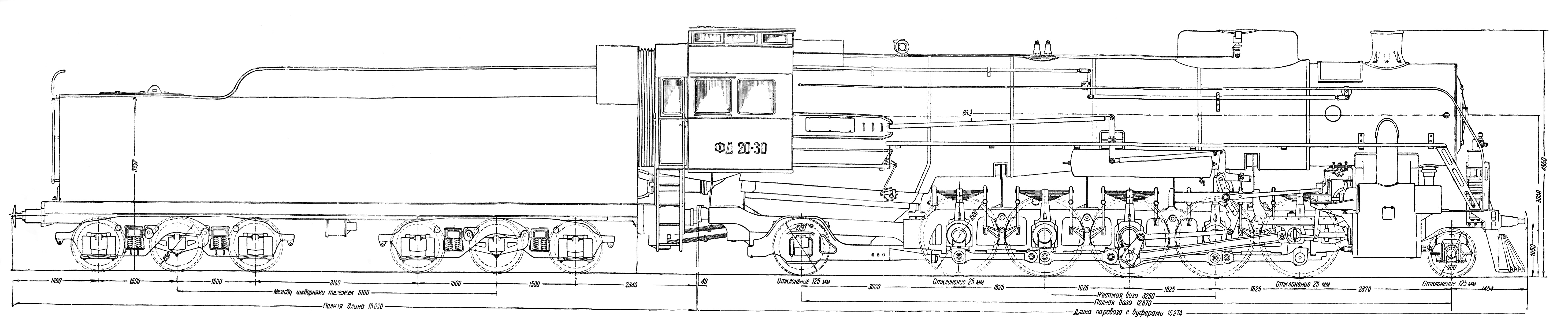 Основные размеры серийного паровоза ФД20-30 (1-го заказа) с тендером типа 17